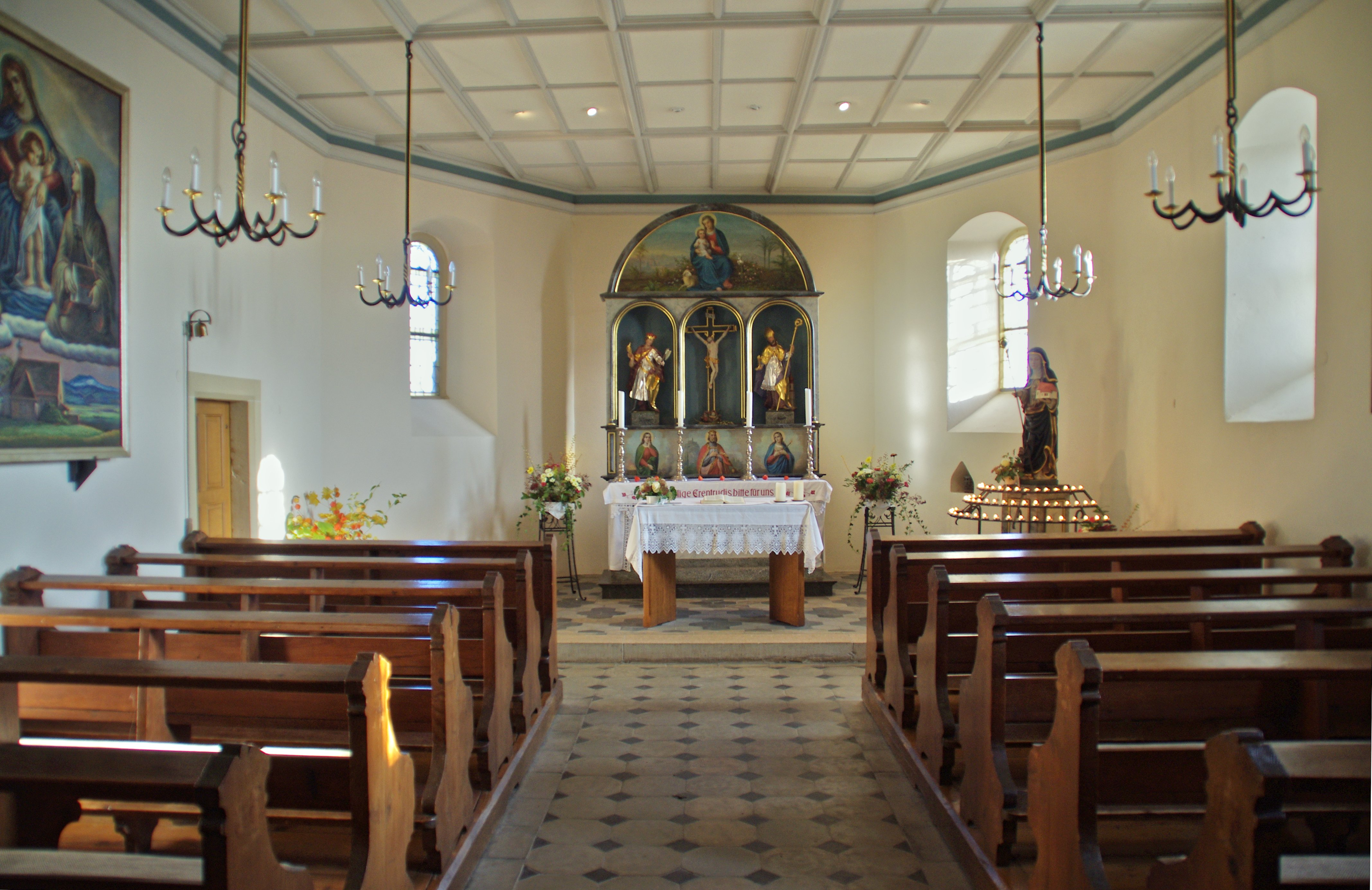 Blick vom Eingang in Richtung Altar